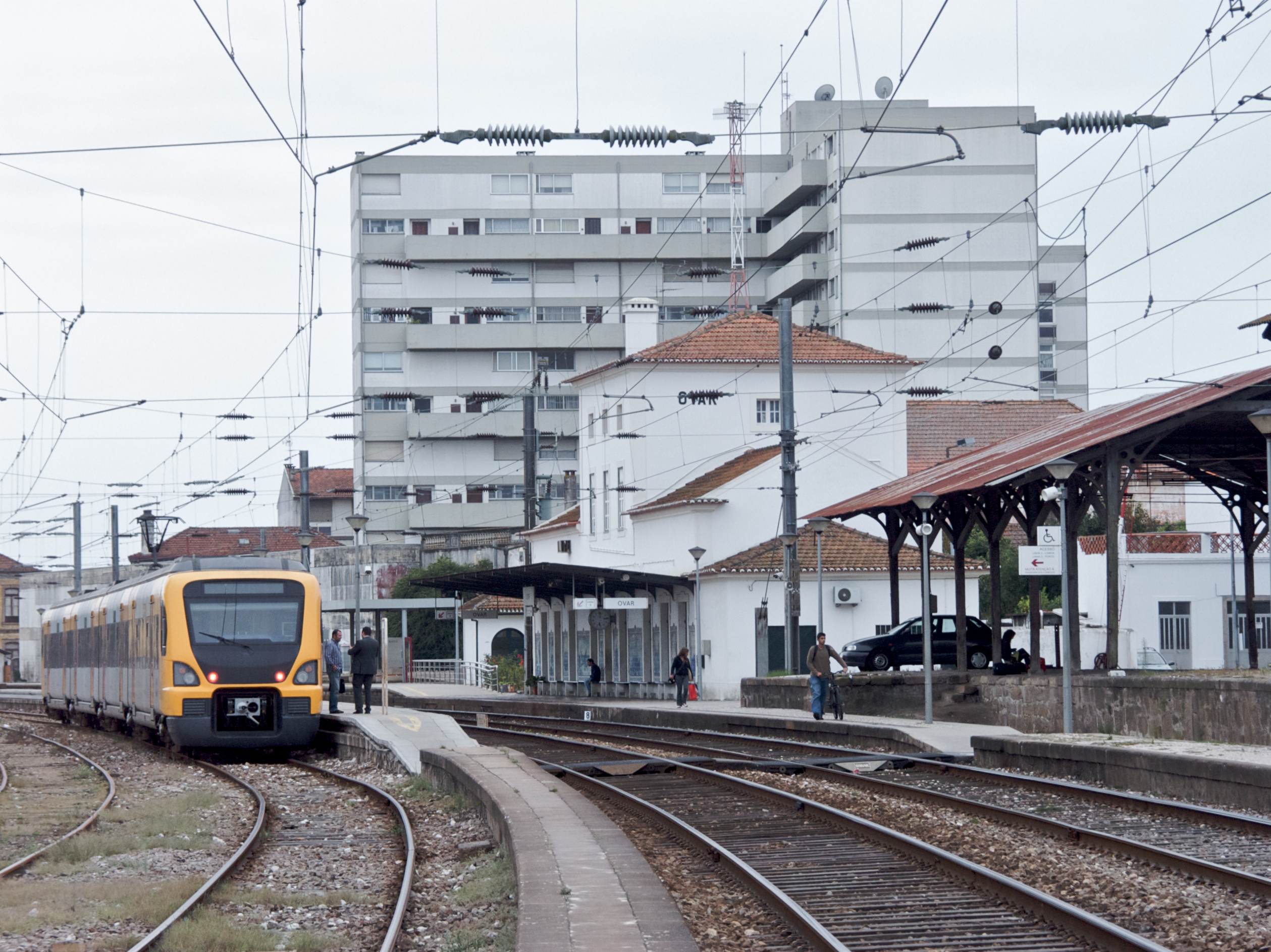 Tipo: E [Estação] Local: Ovar [Linha do Norte , PK 300] Data e hora: 3 de Setembro de 2008 [19h12]